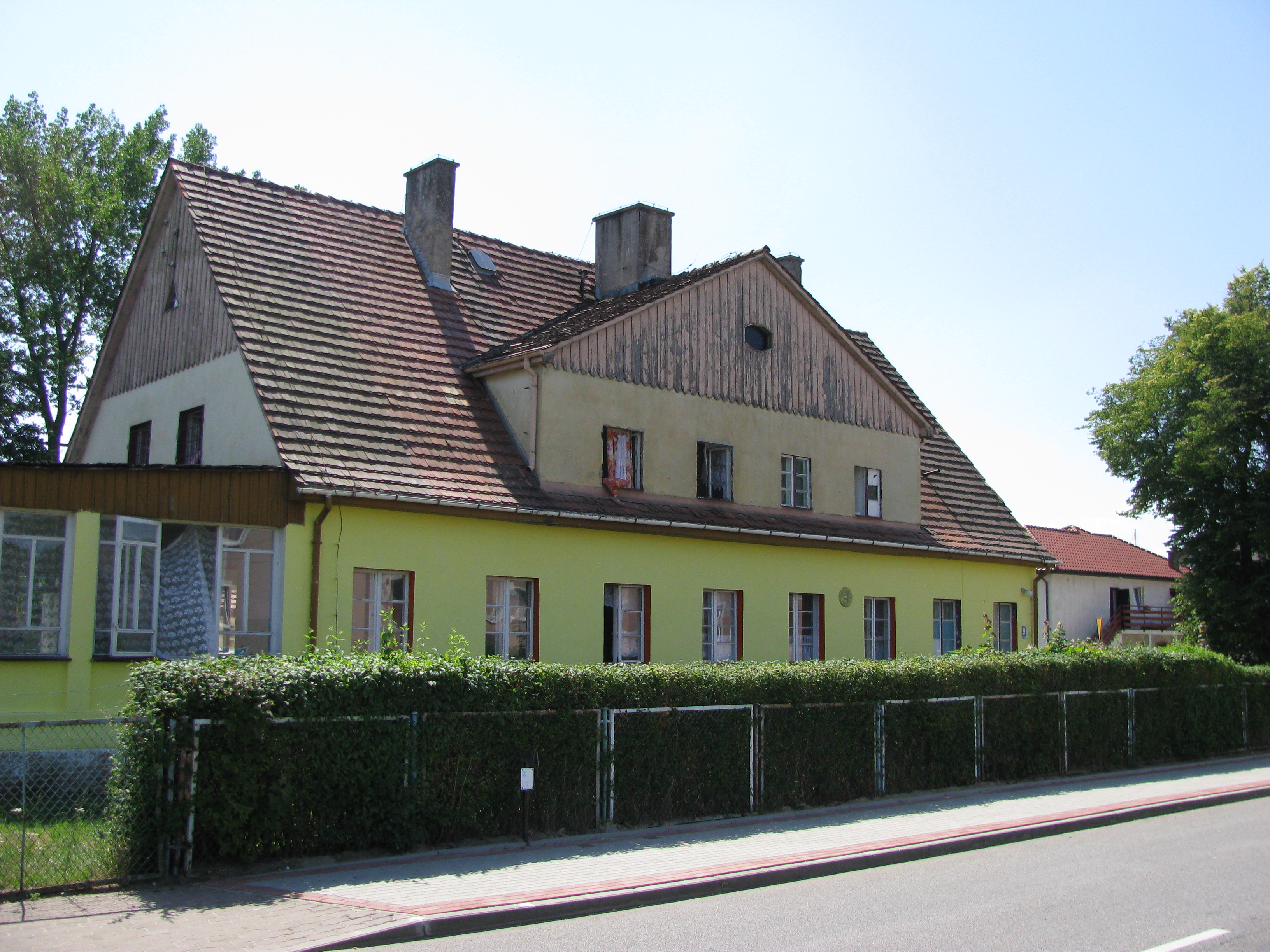 Wisełka, ul. Nowowiejska 21 - Ośrodek ZHP, Hufca Poznań - Grunwald